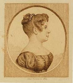 Porträt von Elise Garnerin, französischer Aeronautin. TITLE: Elisa Garnerin, aeronaute / Jules Porreau, sc., 1854. CALL NUMBER: LOT 13400, no. 49 [P&P] LOT 13400, no. 50 Copy in black ink. Find any corresponding online LOT(group) record REPRODUCTION NUMBER: LC-DIG-ppmsca-02233 (color copy scan of no. 49) LC-DIG-ppmsca-02234 (color copy scan of no. 50) No known restrictions on publication. SUMMARY: Head-and-shoulders profile portrait of French balloonist Elisa Garnerin. MEDIUM: 1 print : etching. CREATED/PUBLISHED: Paris : Vignères, Edr., 30, Quai de l'Ecole, [1854] (Paris : Drouart, imp., 11, r. du Fouarre) CREATOR: Porreau, Jules, etcher. NOTES: Library has two versions: printed in brown ink (no. 49) and black ink (no. 50). DLC Title from item. Tissandier collection. SUBJECTS: Garnerin, Elisa, 1791- Balloonists--French--1850-1860. FORMAT: Portrait prints 1850-1860. Etchings 1850-1860. REPOSITORY: Library of Congress Prints and Photographs Division Washington, D.C. 20540 USA DIGITAL ID: (color scan of no. 49) ppmsca 02233 (color scan of no. 50) ppmsca 02234 CARD #: 2002724826